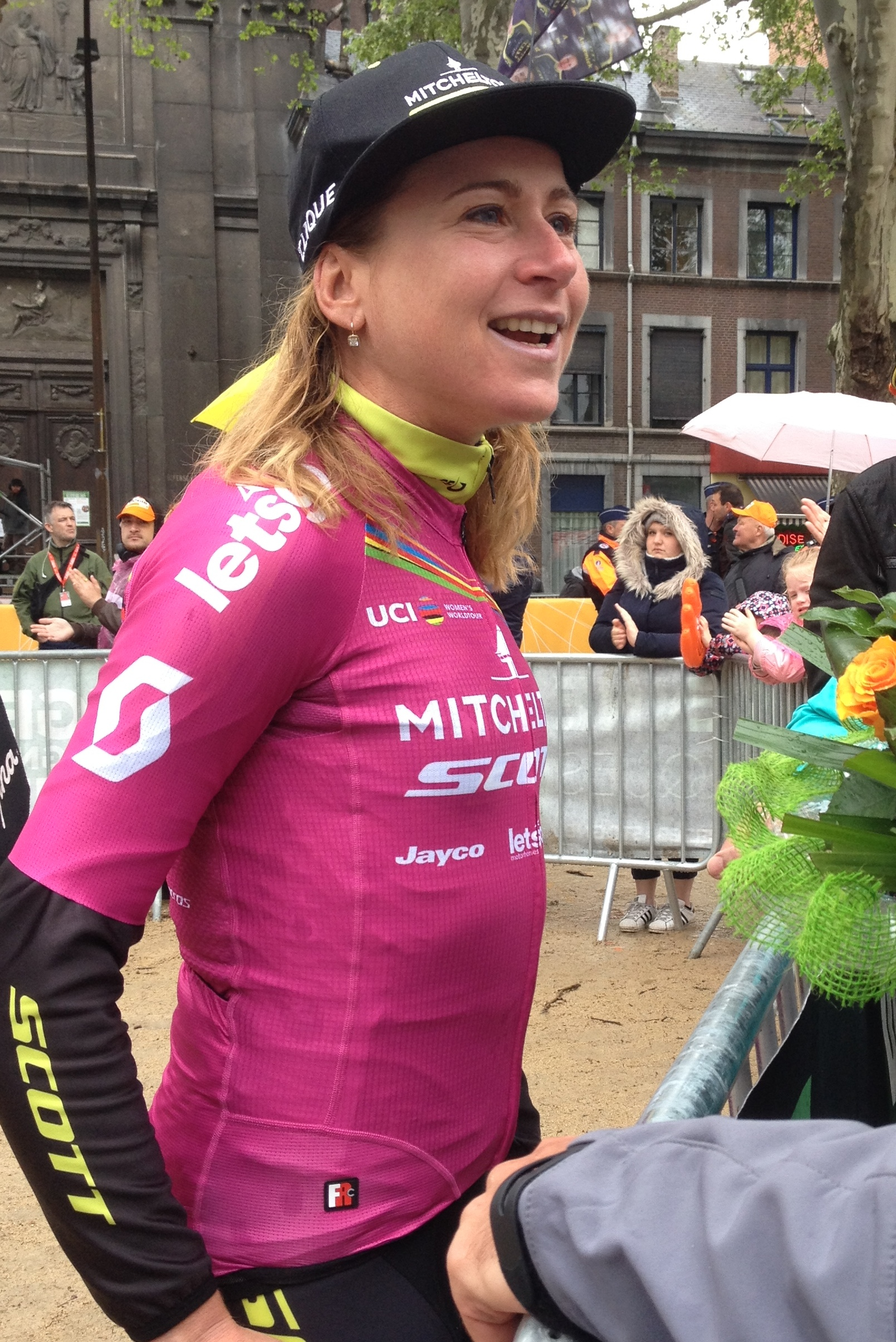 Annemiek van Vleuten in de leiderstrui van de Women's World Tour na haar zege in Luik-Bastenaken-Luik 2019